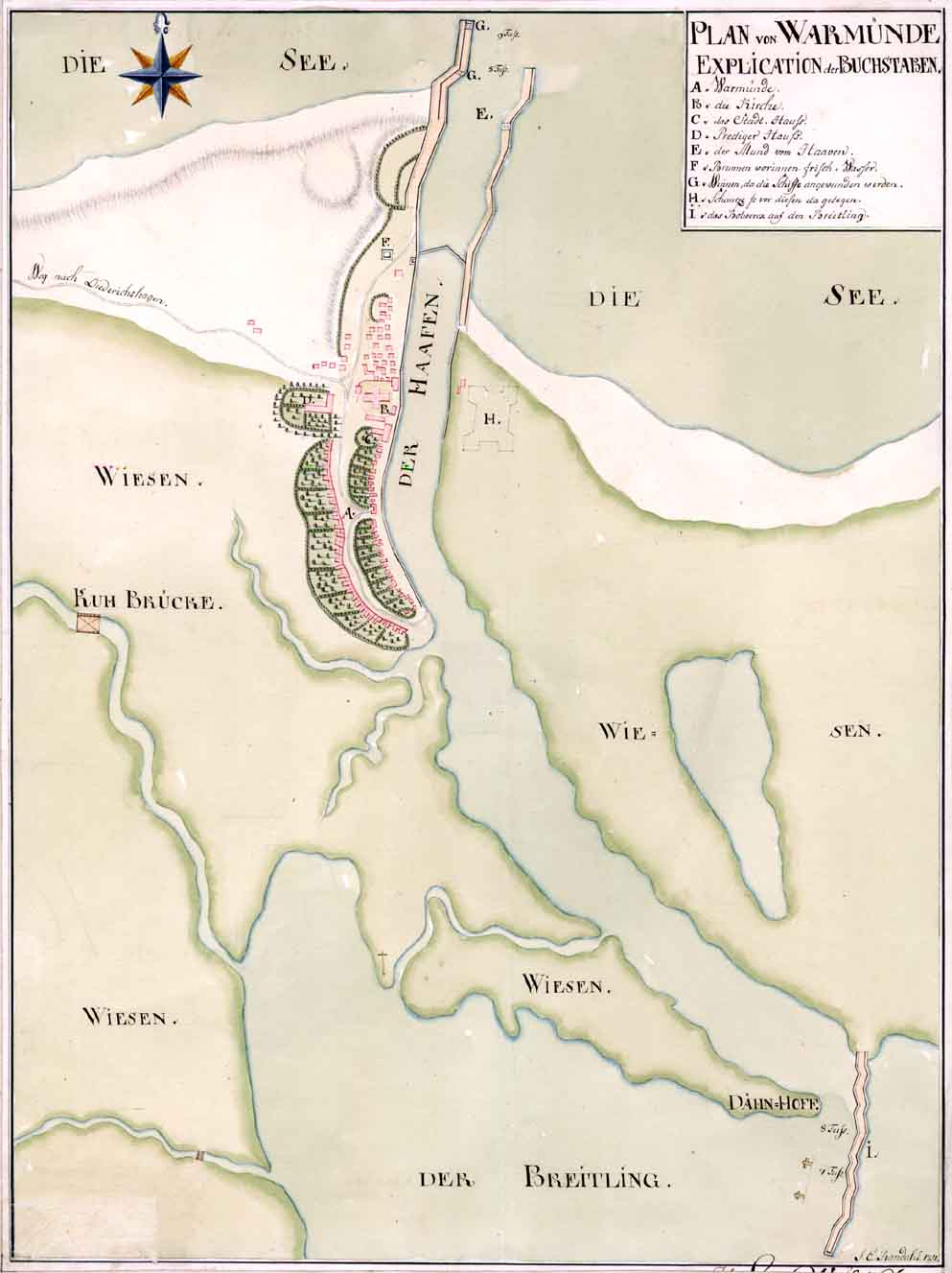 Plan des Ortes Warnemünde (Rostock).